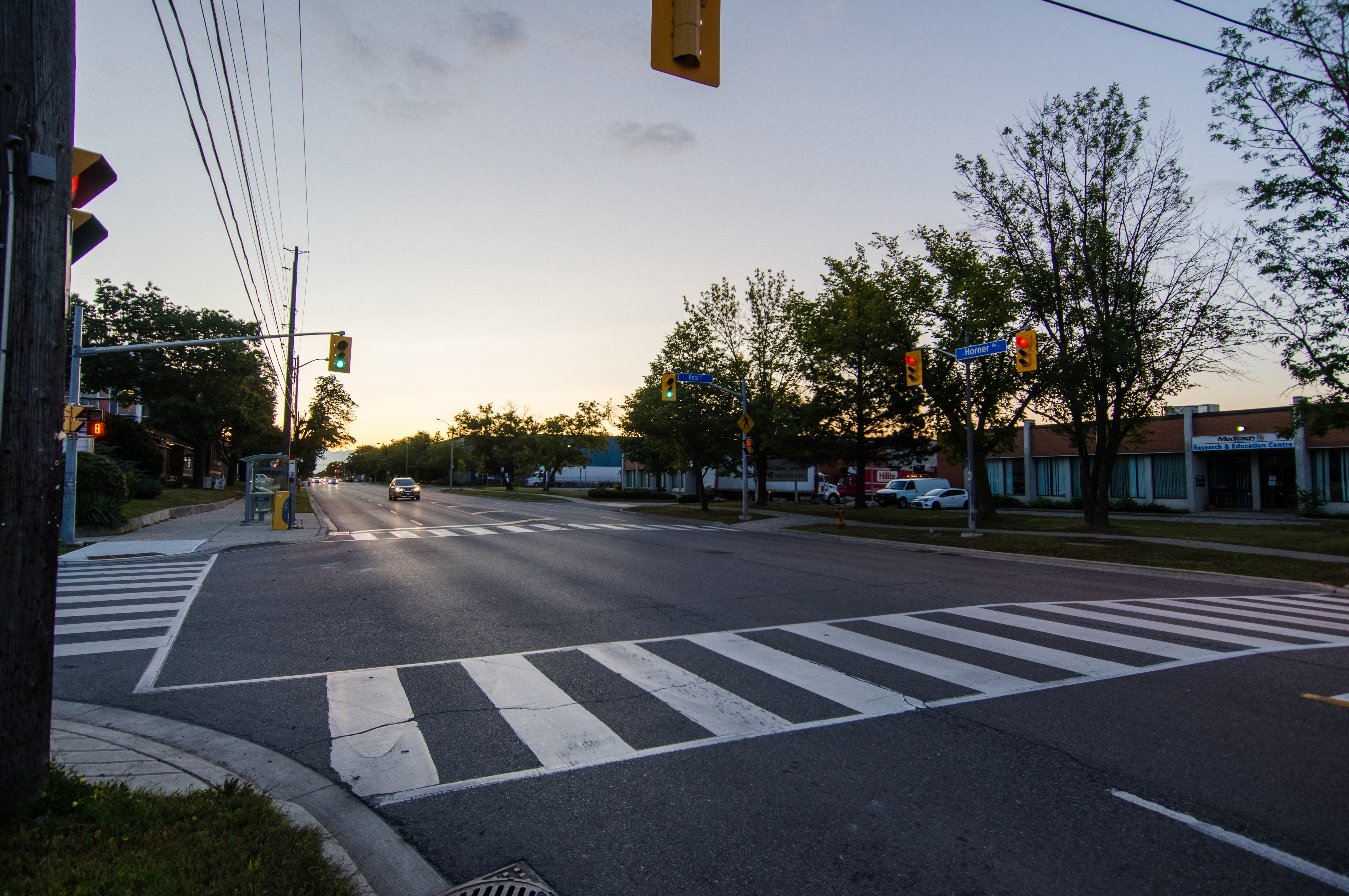 Seen in Lost Girl episode #516.